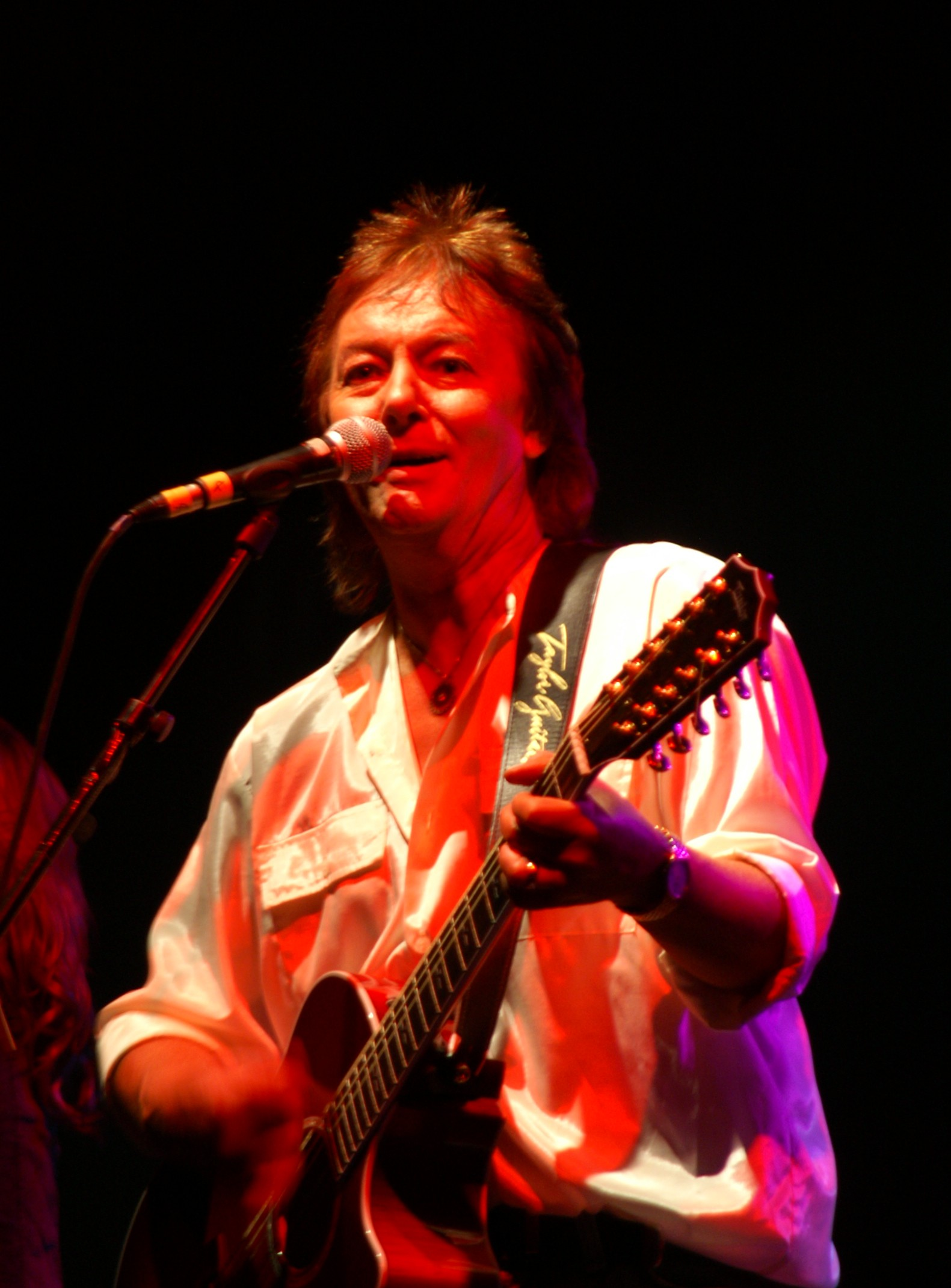 Chris Norman bei einem Konzert in Erfurt